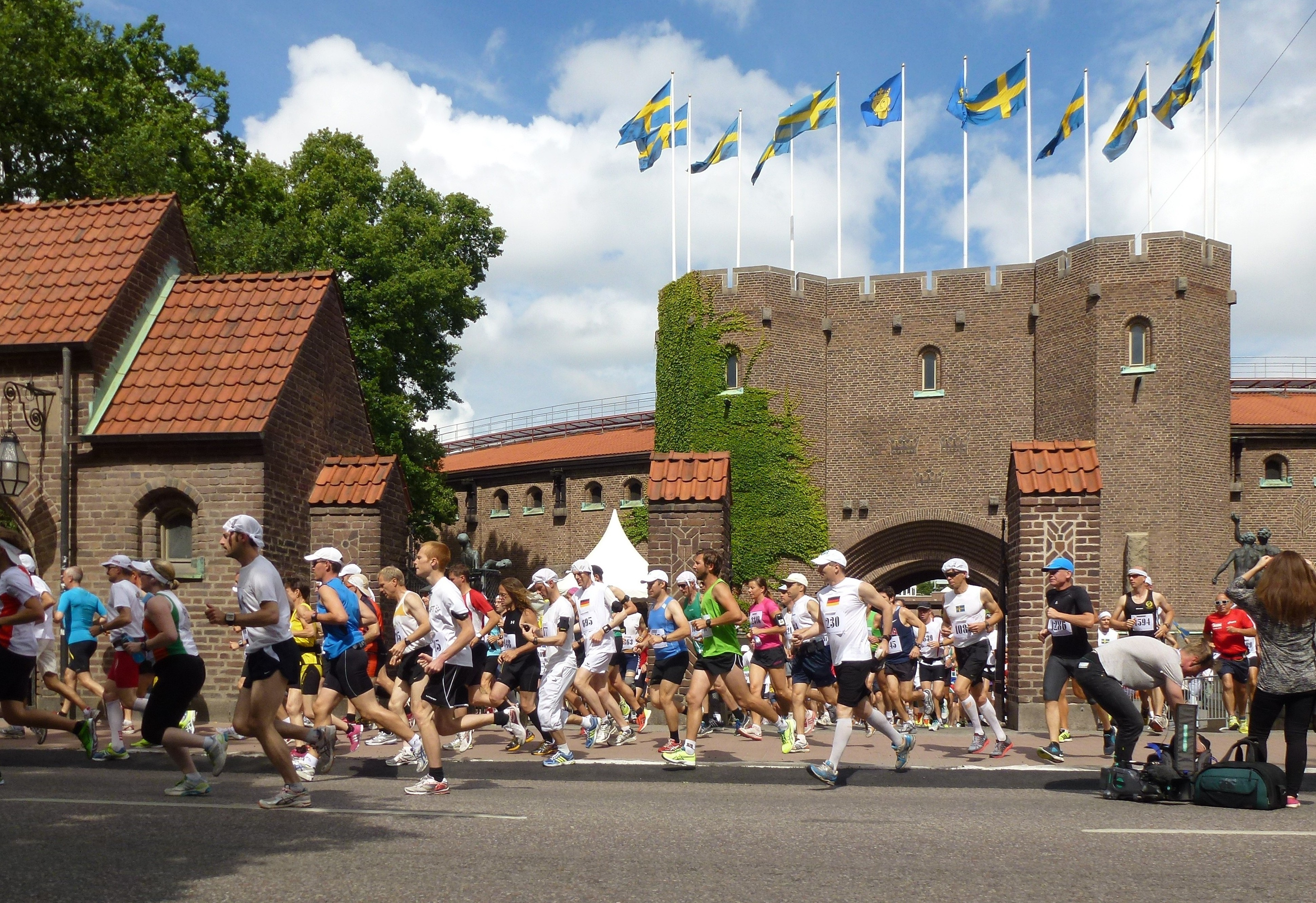 Stockholms stadion "Jubileumsmarathon 2012-07-14"